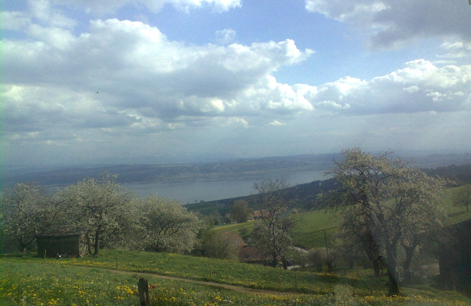 Montalchez Lac